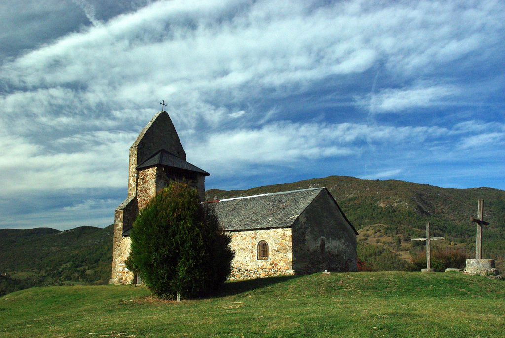 Chapelle Saint-Michel (XVe s.) .